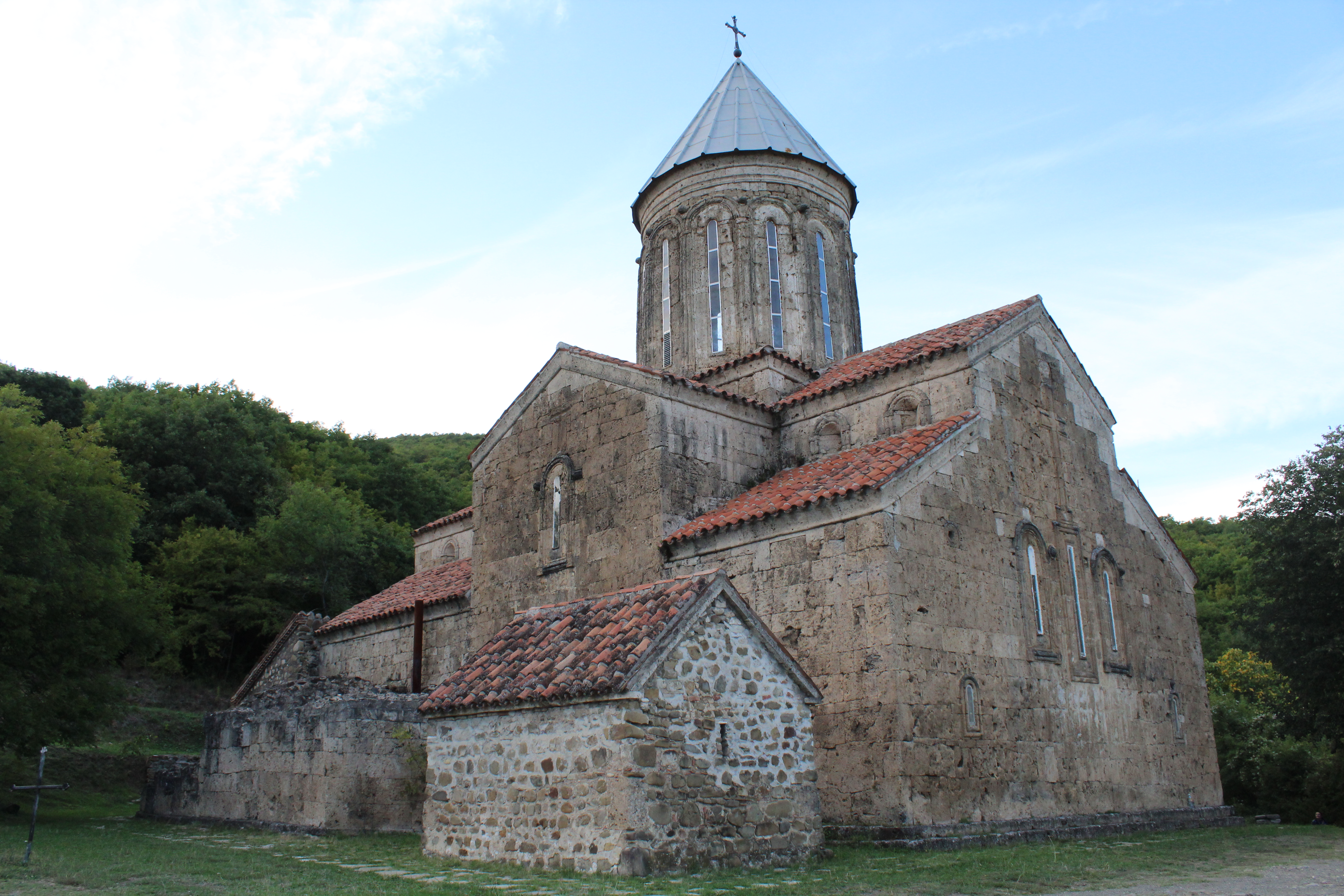 საბაწმინდის ეკლესია კარდენახში